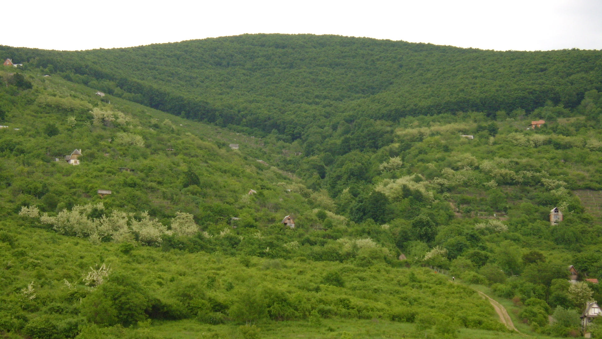 Чорна Гора (Виноградів)